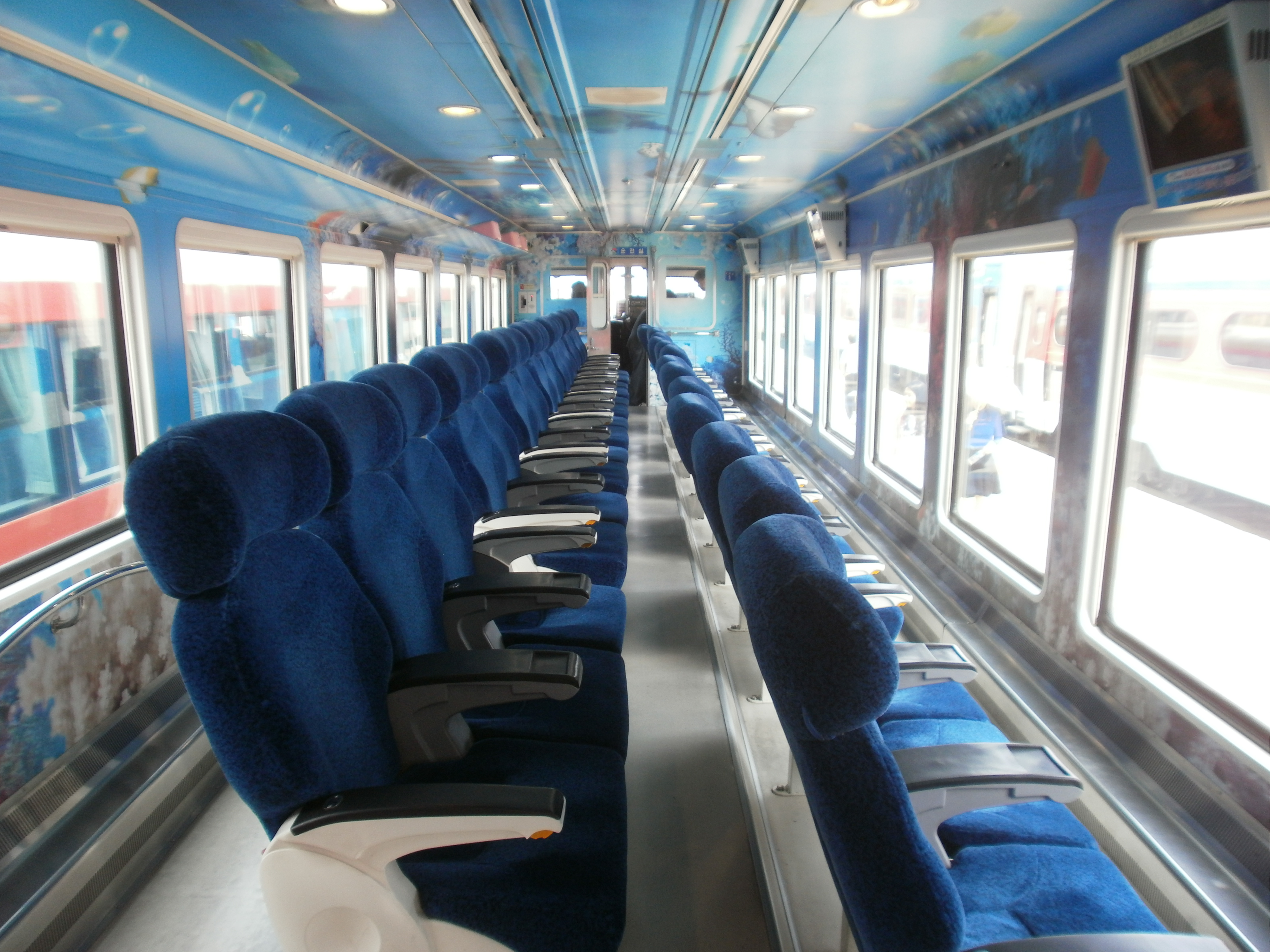 바다열차 특실 1호차 내부